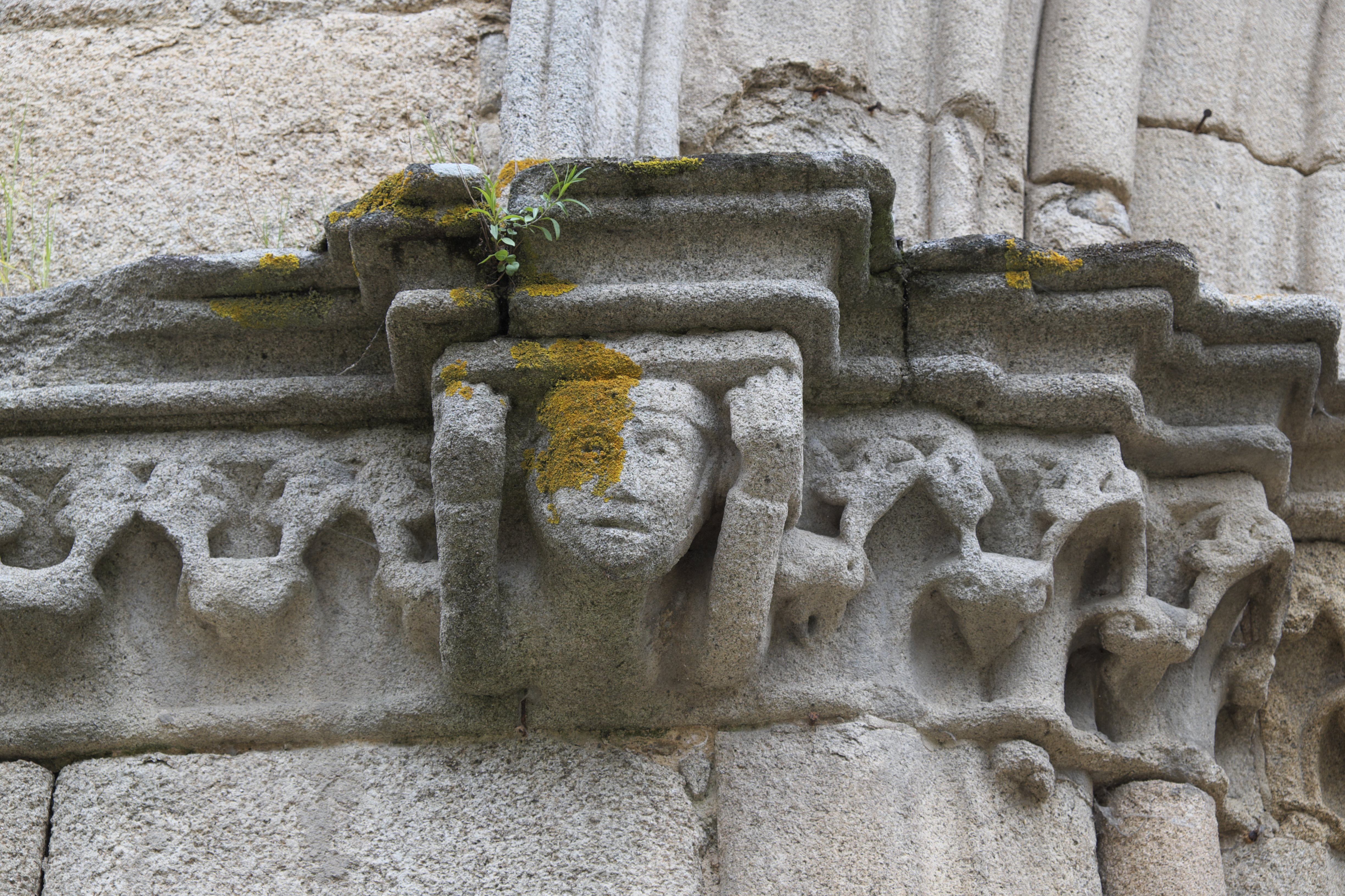 Stiftskirche Saint-Étienne in Eymoutiers im Département Haute-Vienne (Nouvelle-Aquitaine/Frankreich), Konsolen an der Fassade